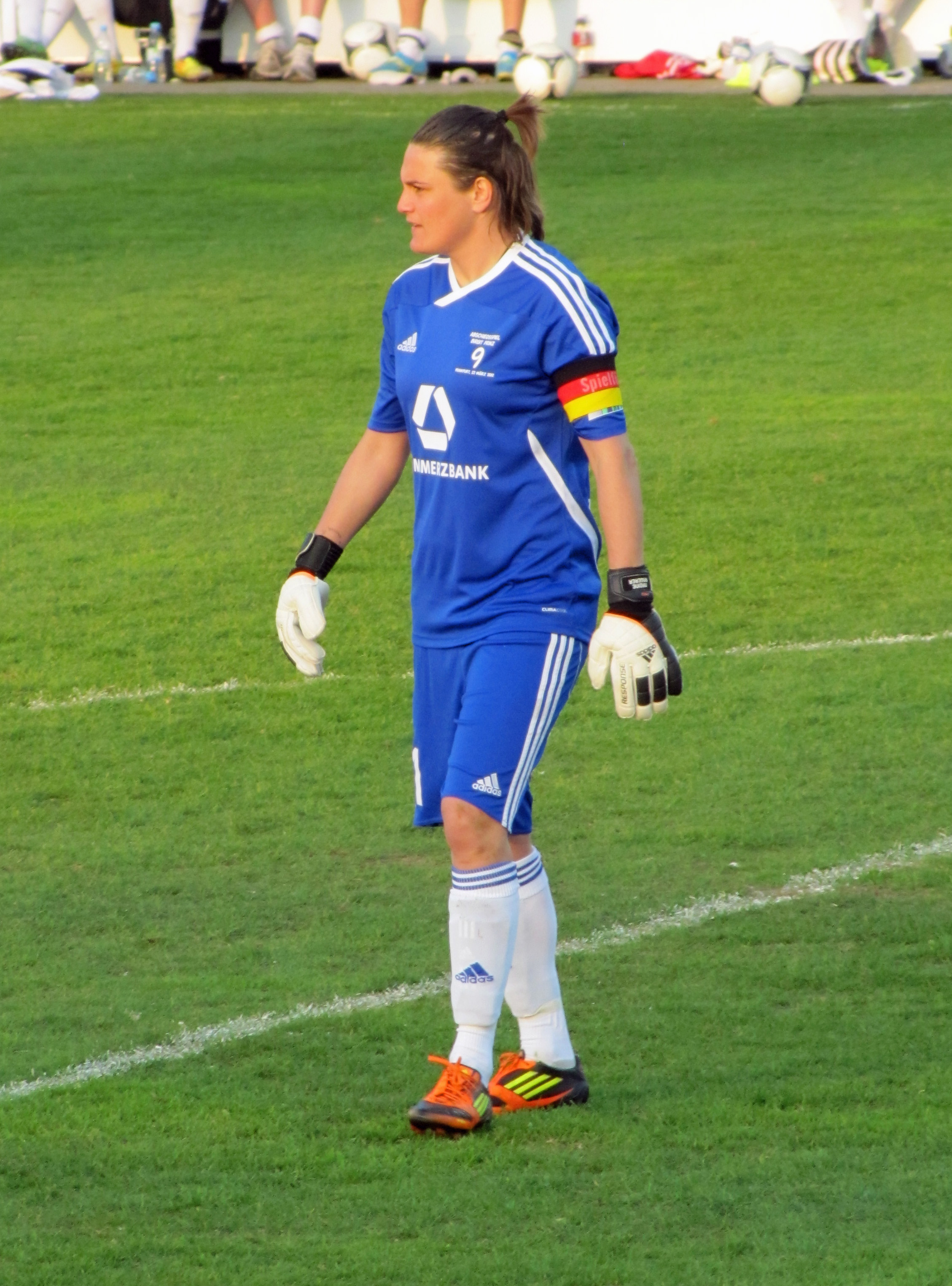 DFB-Abschiedsspiel für Birgit Prinz im Volksbank-Stadion in Ffm. Nadine Angerer, 2. Halbzeit, Torfrau für die Nationalmannschaft.